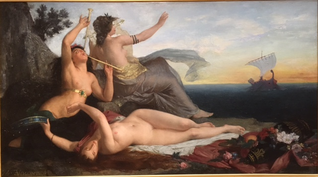 Edouard Vimont, Les Sirènes, 1874, Angers, musée des Beaux-Arts